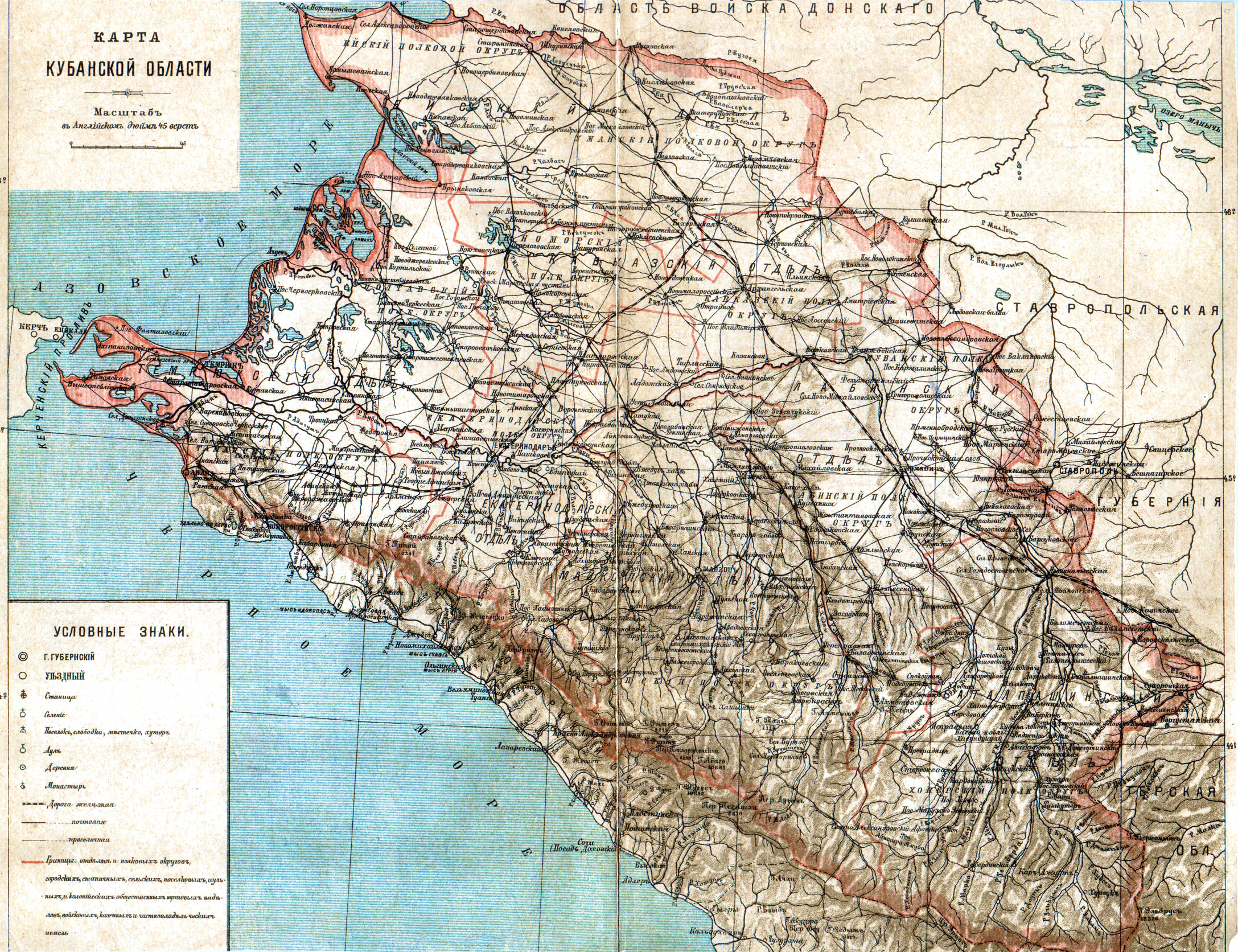 Карта Кубанской области из ЭСБЕ